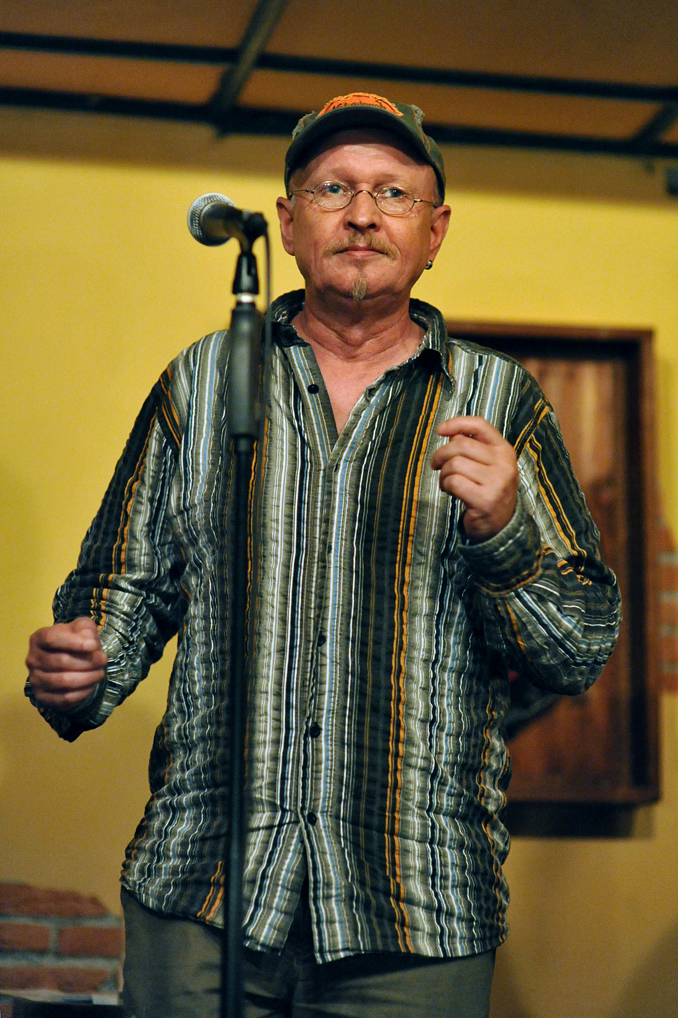 Klaus Büchner bei einem kurzen Gastauftritt im irish pub "The Old Dubliner" in Hamburg